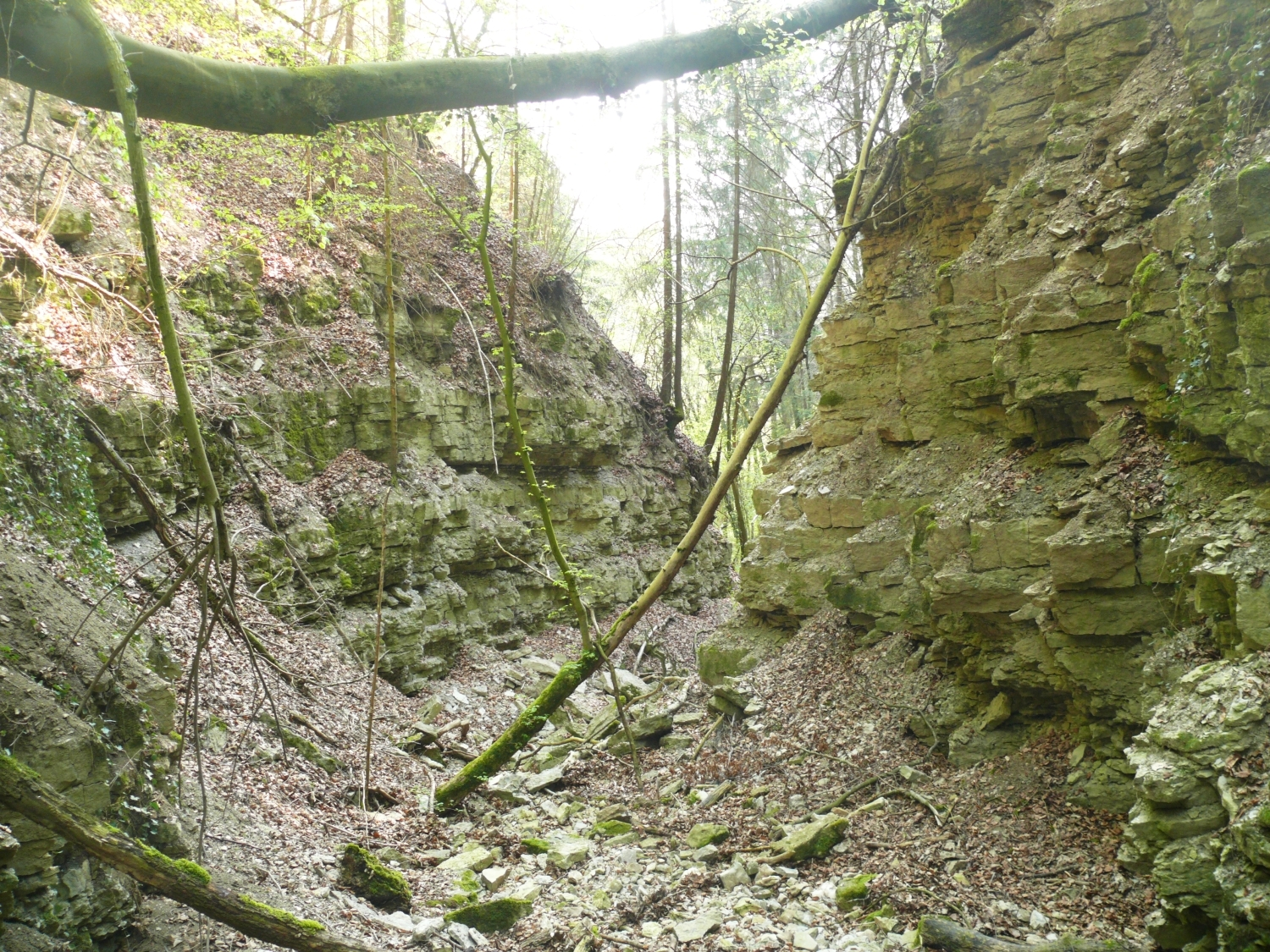 Kressenklinge bei Unterscheffach Aufschluß der unteren Bereiche des Oberen Muschelkalk Trochitenkalk-Formation mit -Crailsheim-Subformation (Übergang zur Haßmersheim-Subformation) -Kraichgau-Subformation (Zwergfaunaschichten)